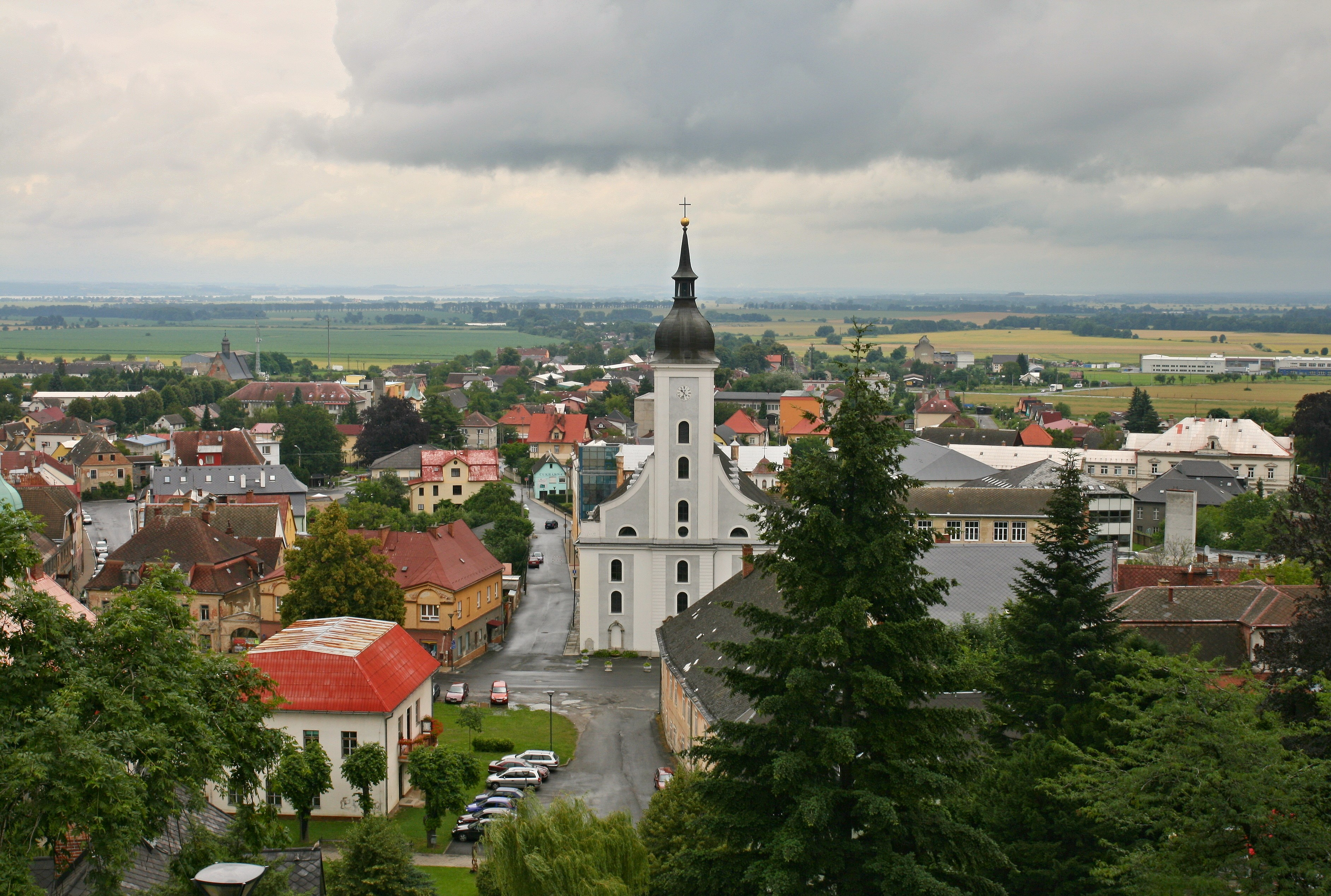 Kostel Nejsvětější Trojice, Puškinova, Javorník (okres Jeseník).